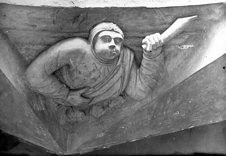 Hôtel Lallemant - Motif de l'escalier : personnage sonnant de la trompe, photographié par Félix Martin-Sabon